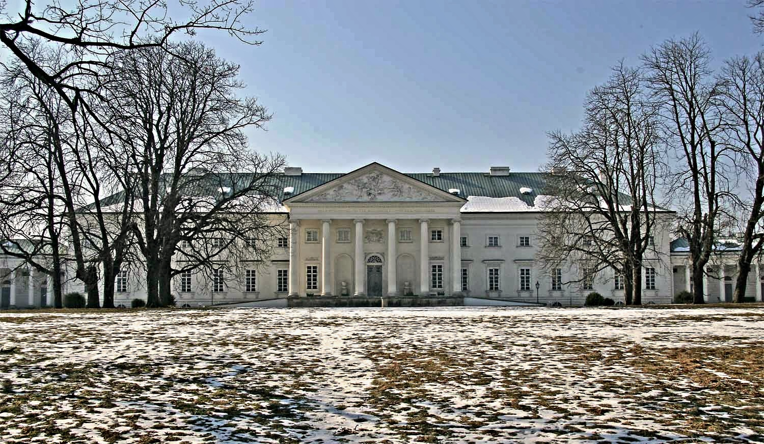 Hlavní budova zámku Kačina při pohledu z čestného dvora